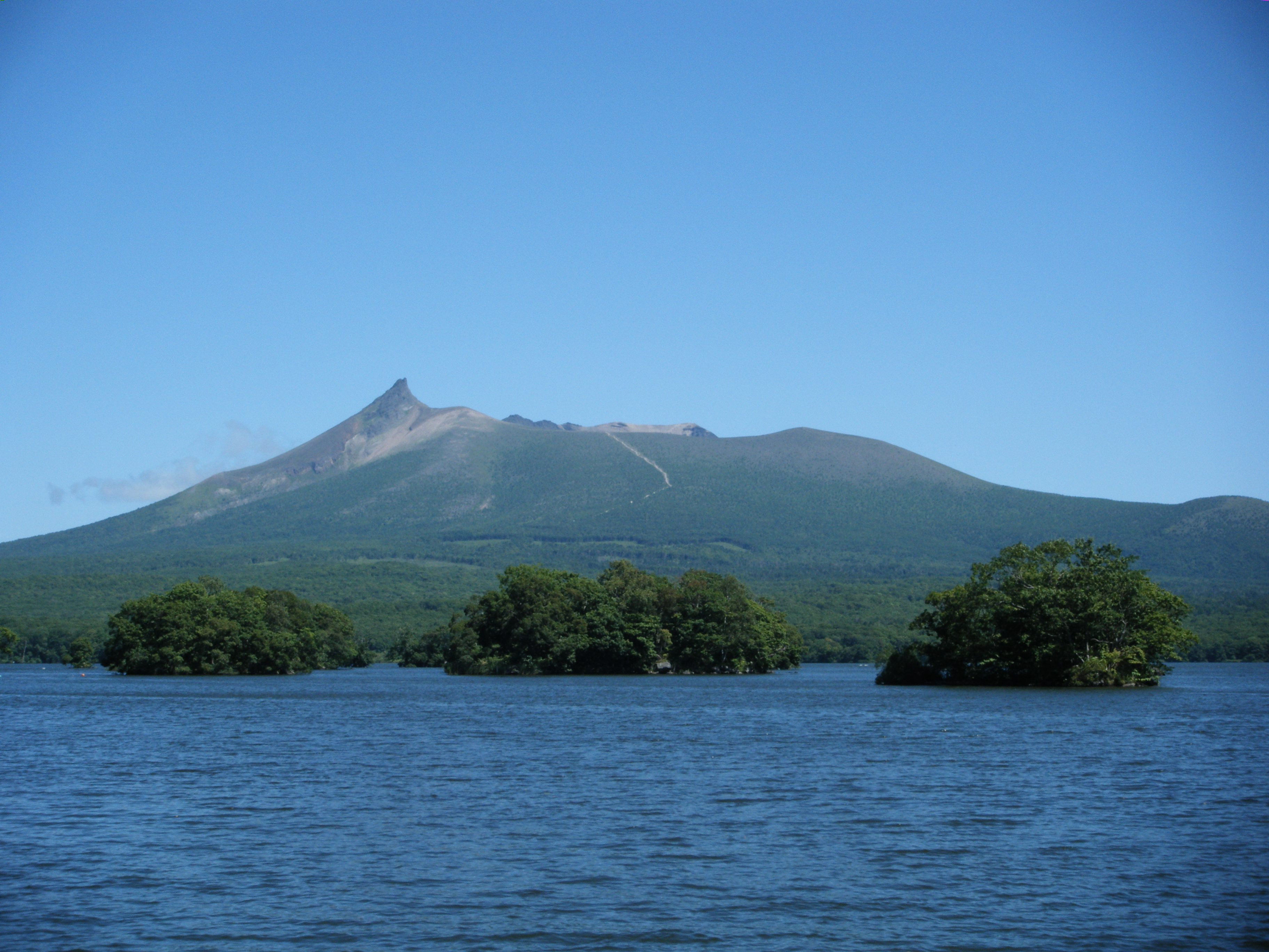 大沼公園内にて